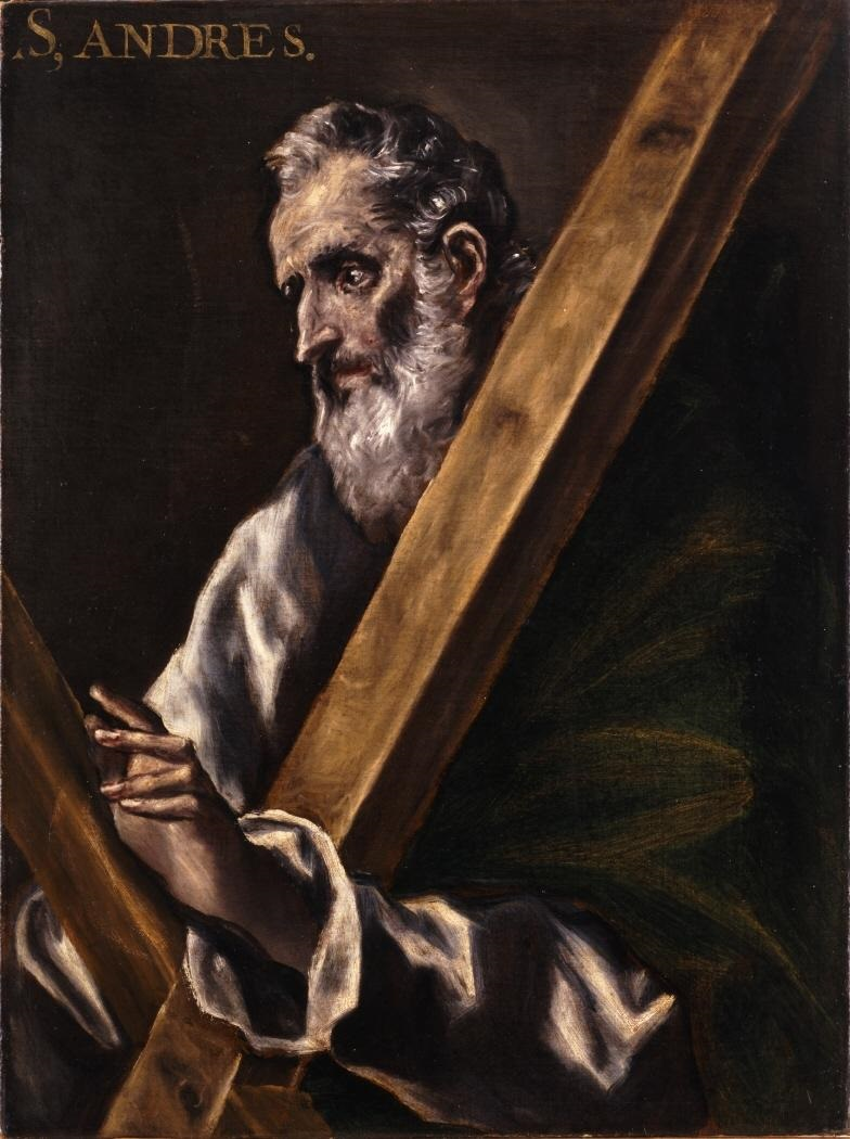 La obra representa al apóstol San Andrés, que aparece portando una cruz en forma de aspa como símbolo de su martirio.